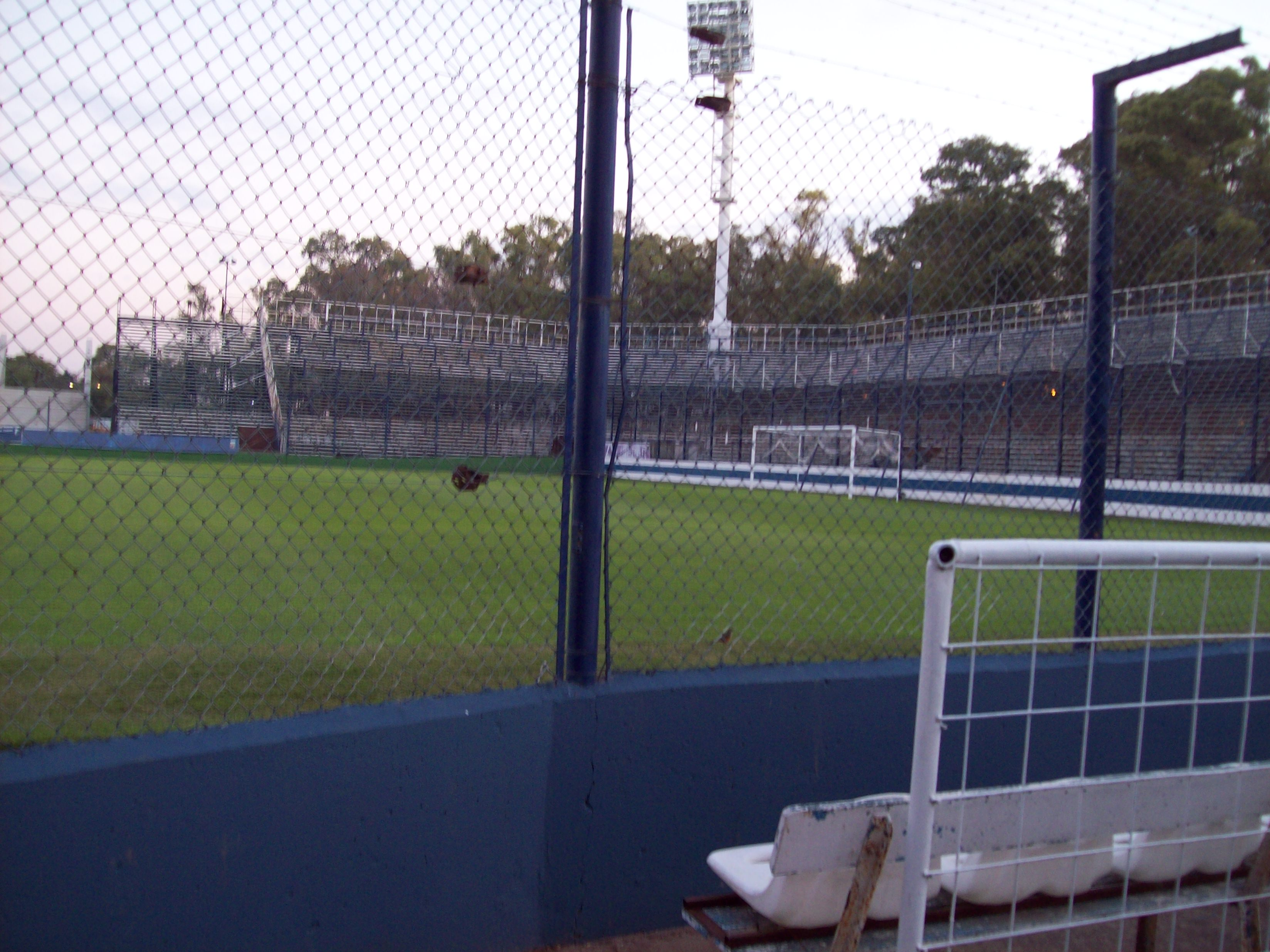 Museo Tripero - Estadio Juan Carmelo Zerillo.